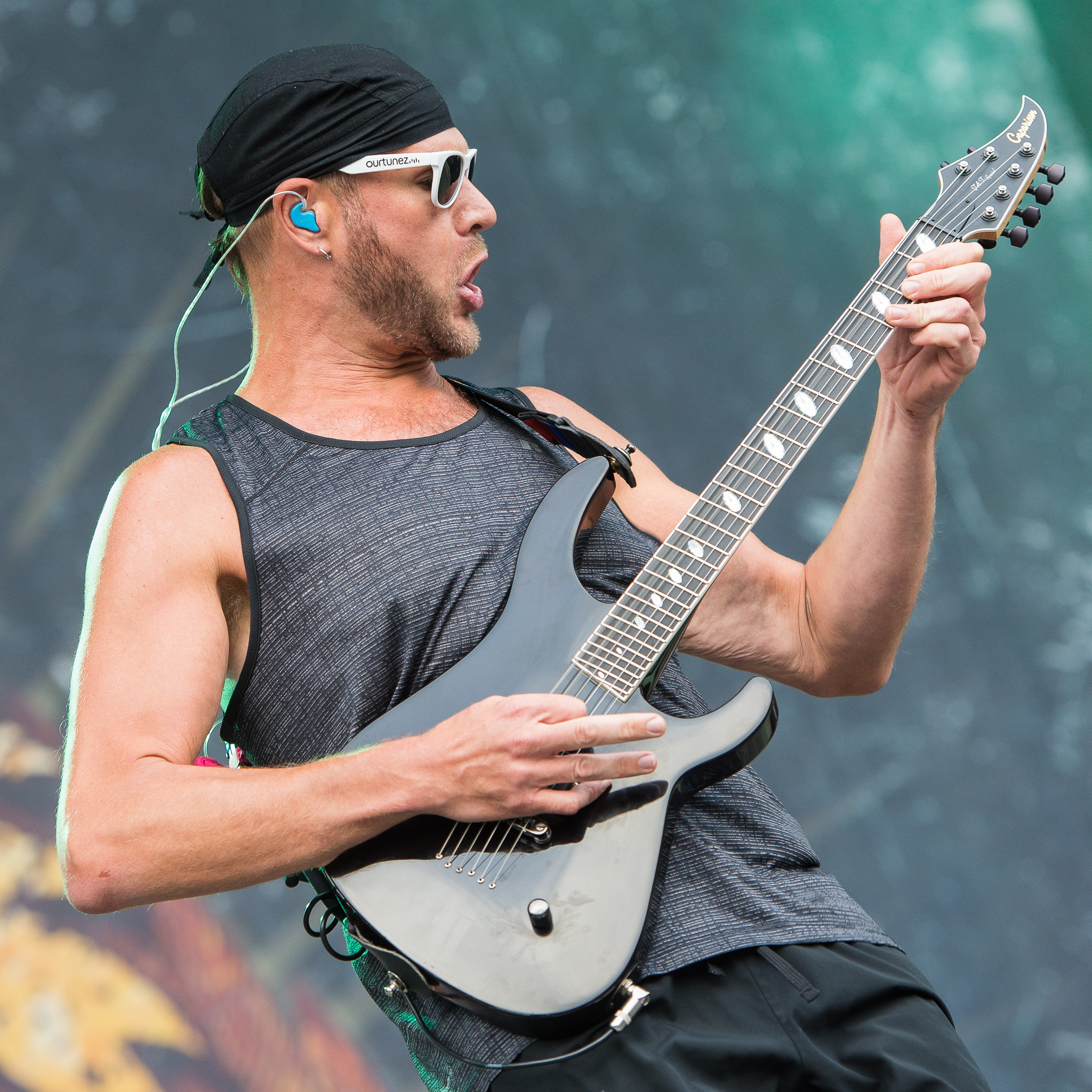 ARGO-Konzerte,Beck's Park Stage,Festival,Killswitch Engage,Konzert,Livekonzert,Livemusik,Musik,RiP,Rock im Park 2016